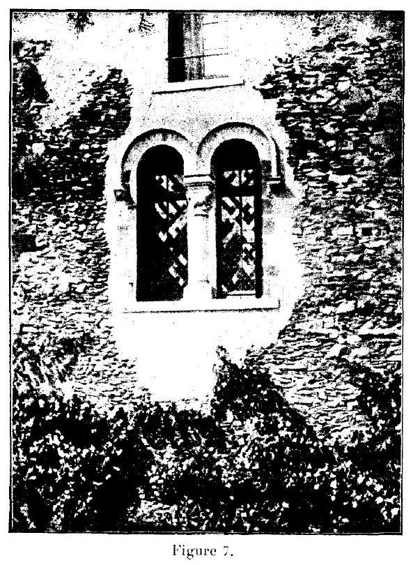 Le Donjon de Courmenant, ses origines, ses seigneurs et possesseurs, son musée